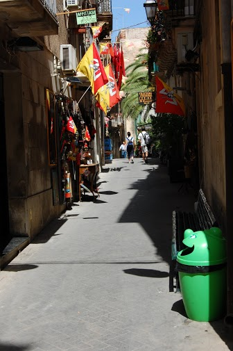 Vicoli d'Ortigia (Bandiere siciliane)